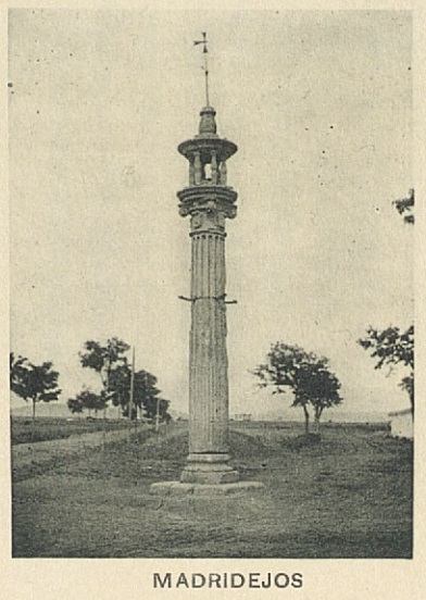 Rollo o picota de Madridejos